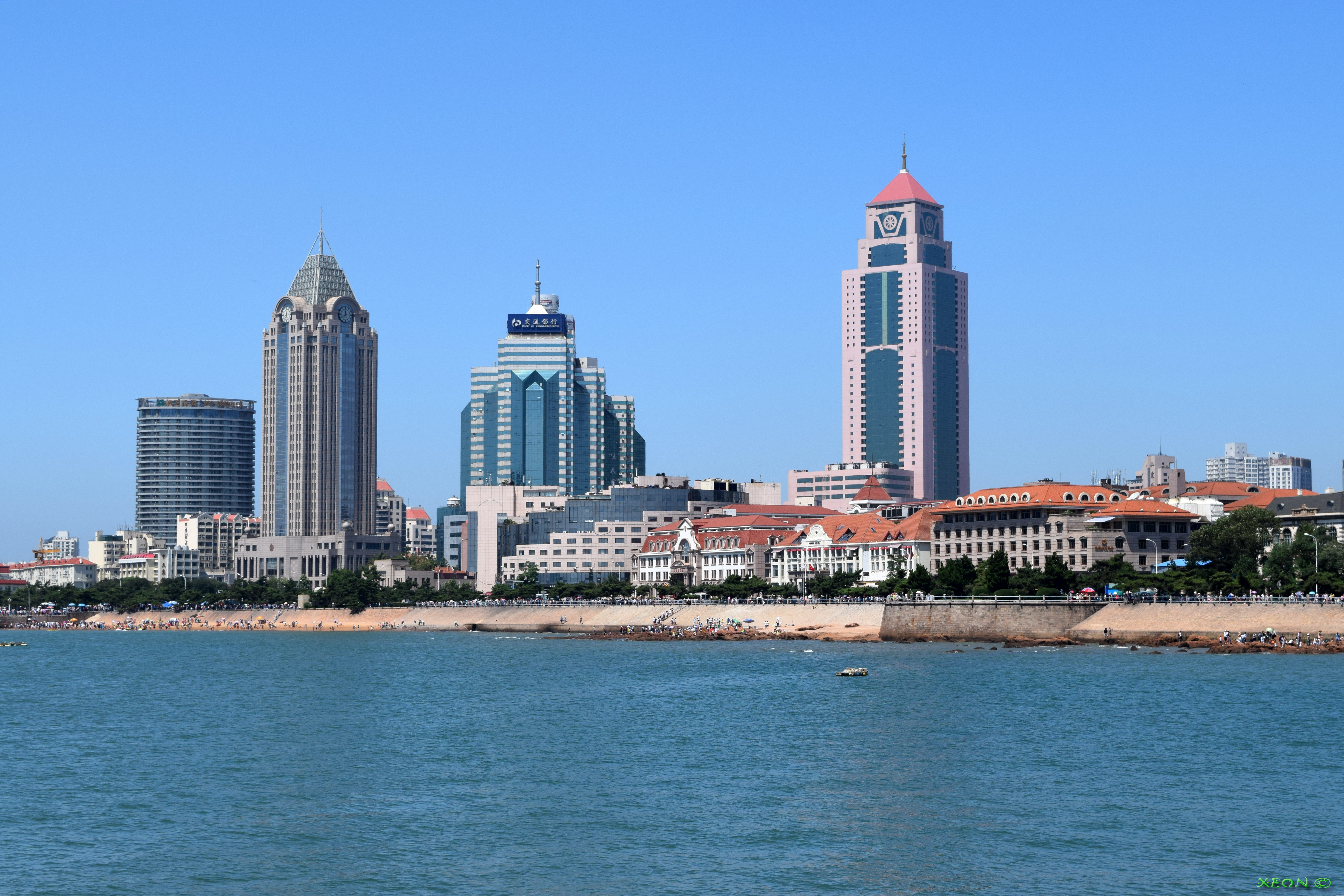 View